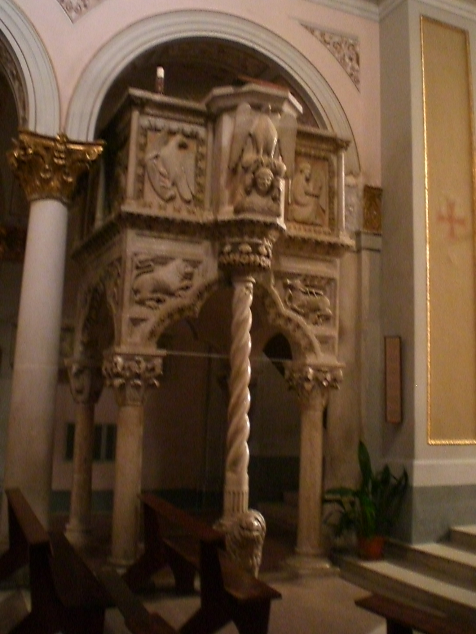 Ambone della cattedrale di Teggiano